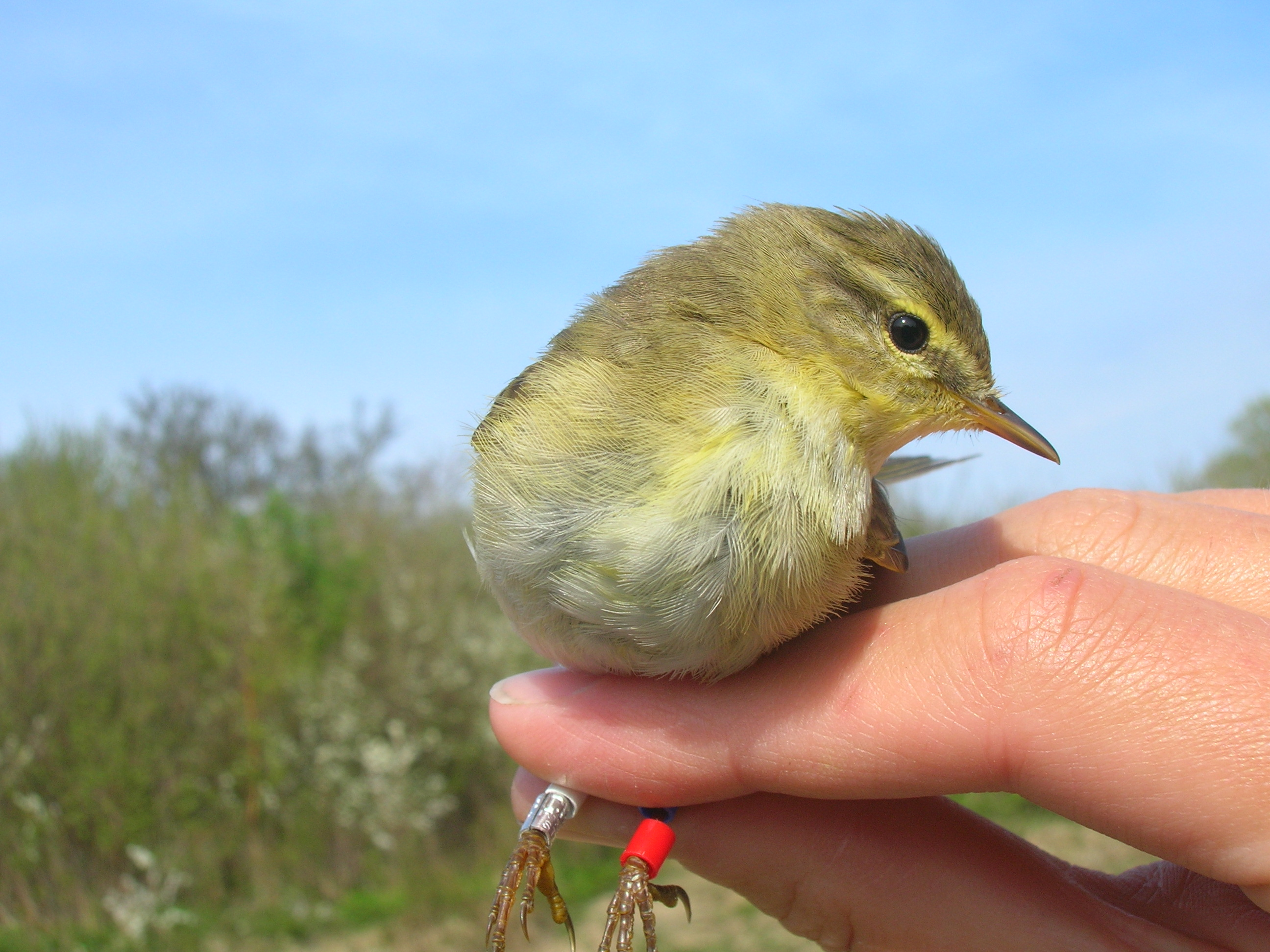 En lövsångare som ingår i en studie gjord av Stockholms Universitet.